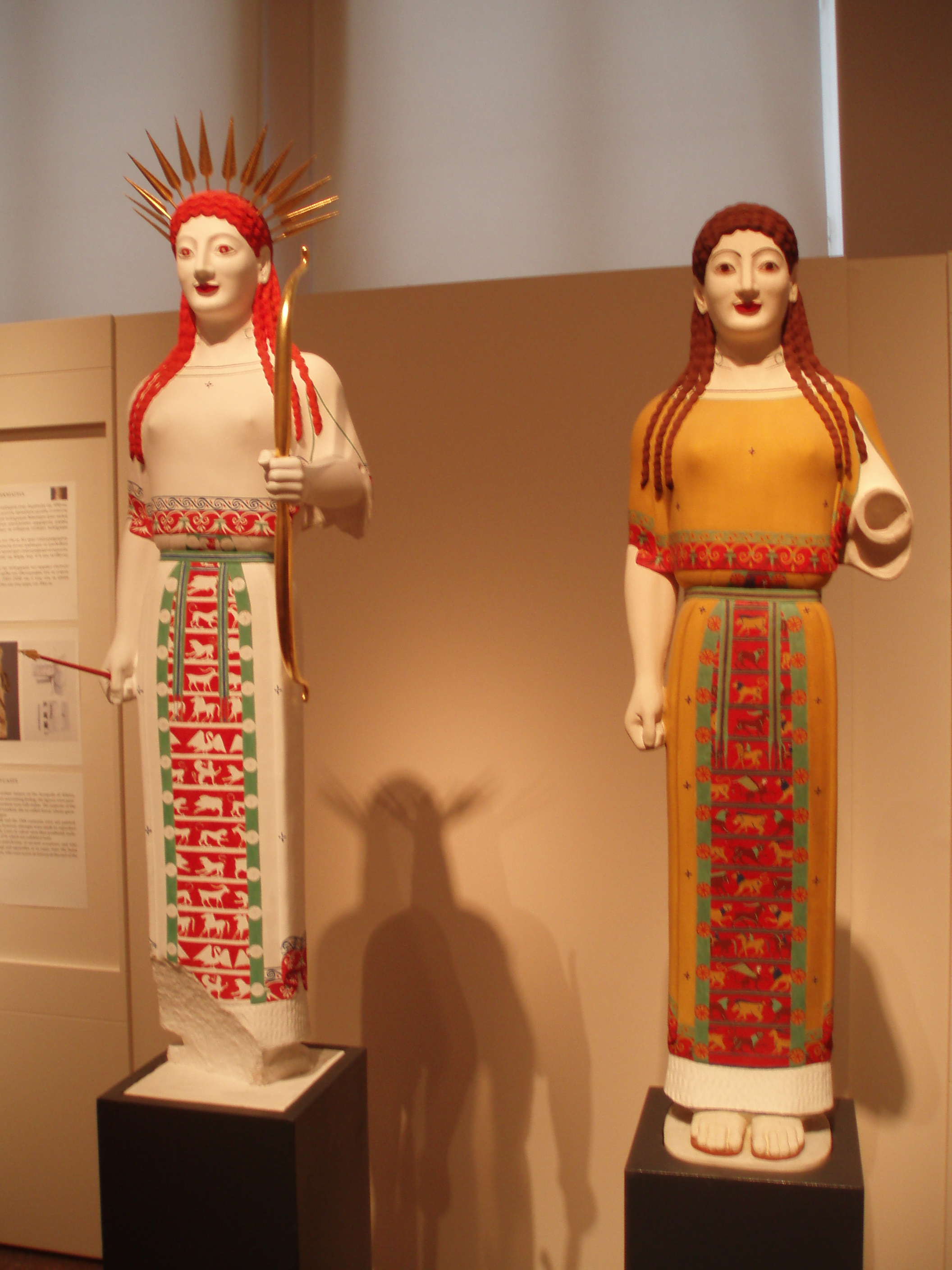 Restitution du décor polychrome de la Korè au péplos, vers 530-520 : à gauche sous les traits de la déesse Artémis, à droite sous ceux d'Athéna.Etude : Vinzenz Brinkmann. Restauration des cassures : Alfons Neubauer, Christoph Bergmann. Dorure : Sylvia Kellner. Peinture : Ulrike Koch-Brinkmann. Original : Acropole d'Athènes (Inv. n°679). Copie peinte : Staatliche Antikensammlungen und Glyptothek. Exposition « Bunte Götter » dans la version montrée à Athènes.